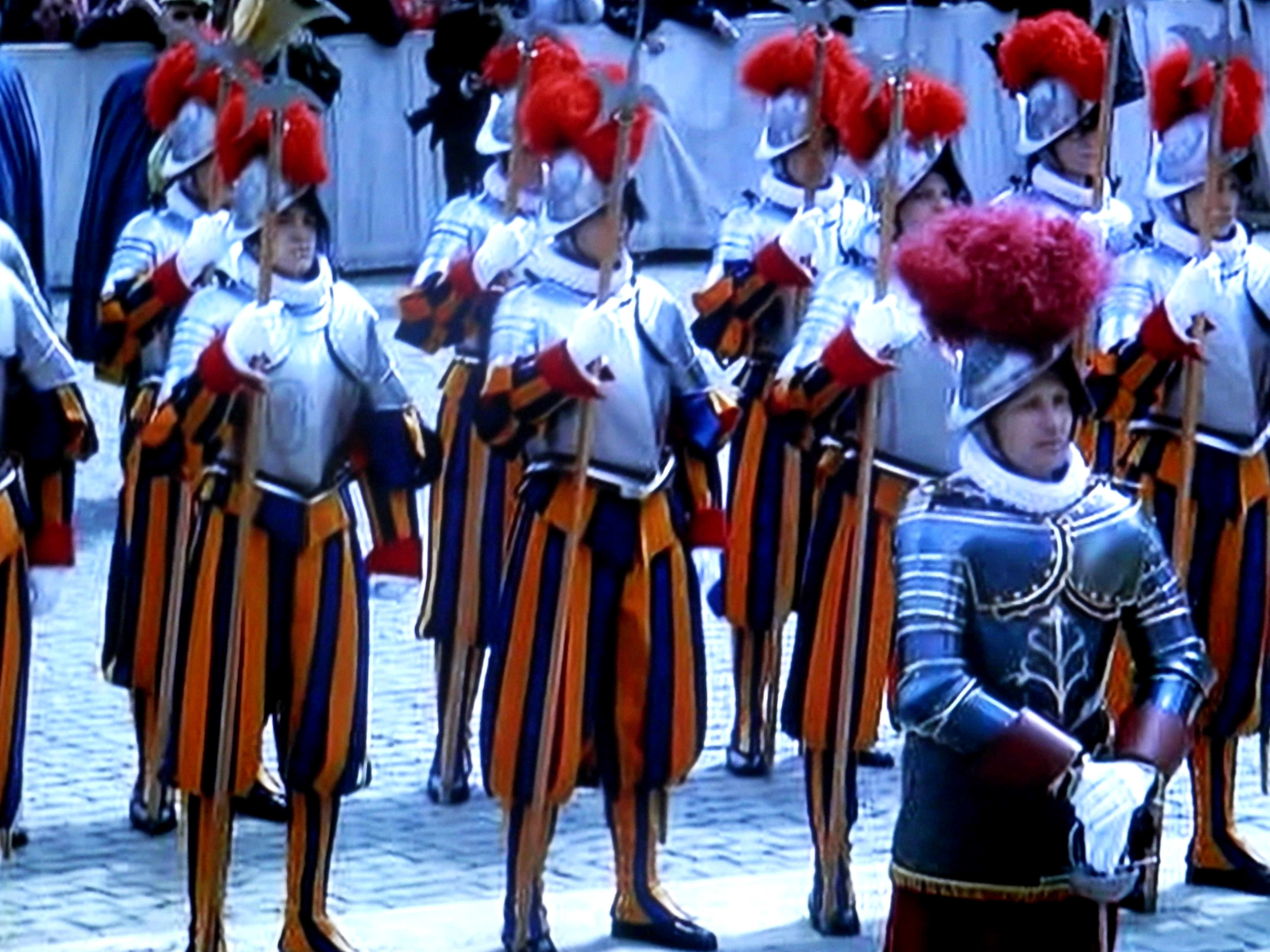 Veľkonočná nedeľa 2018. Pápežská Švajčiarska garda. Námestie svätého Petra. Vatikán.